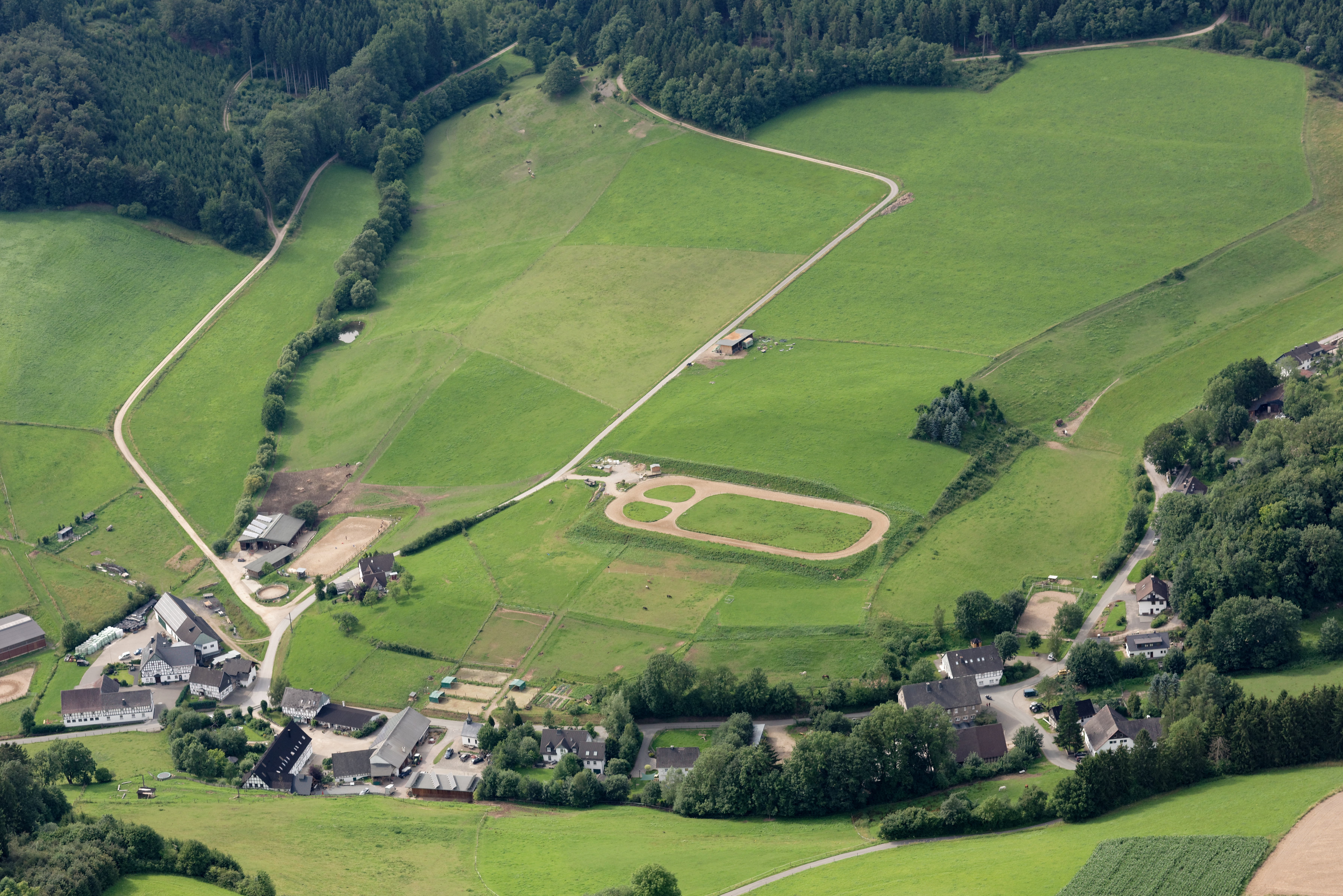 Lennestädter Ortsteil Melbecke